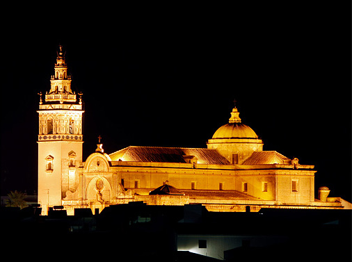 Paroquia Nª Sª de la Granada, de Moguer (Huelva)